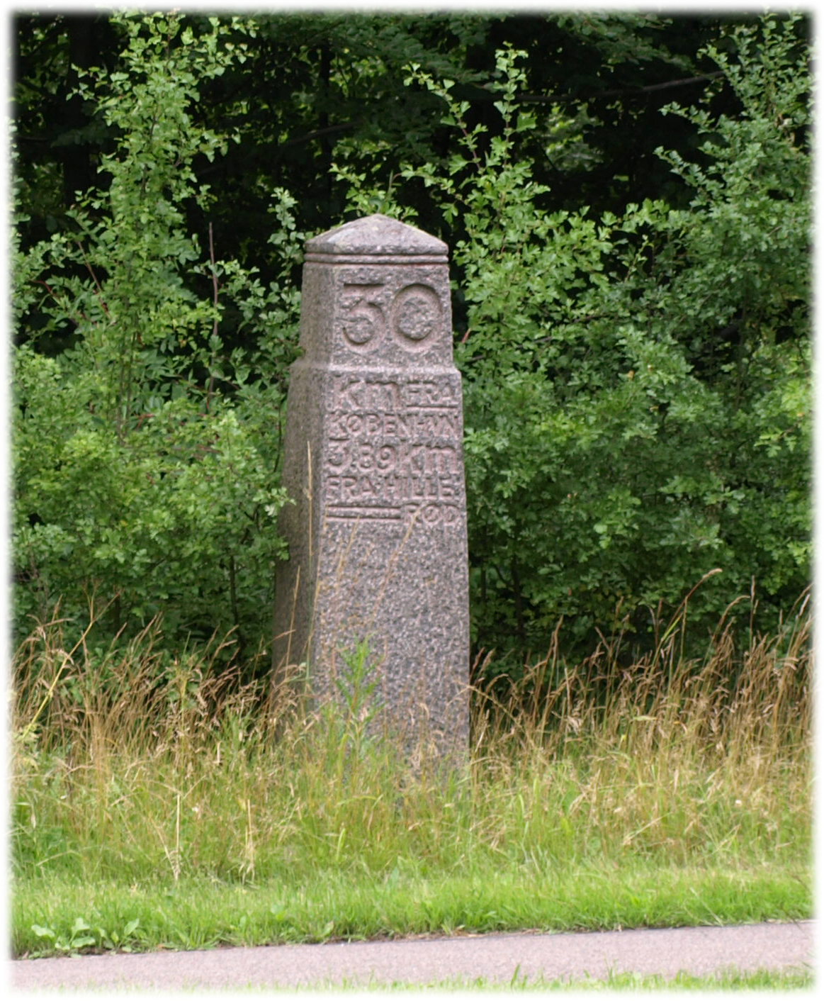 Kilometersten af granit på Kongevejen mellem København og Hillerød. Indskriften lyder: 30 Km fra København. 3.89 Km fra Hillerød.